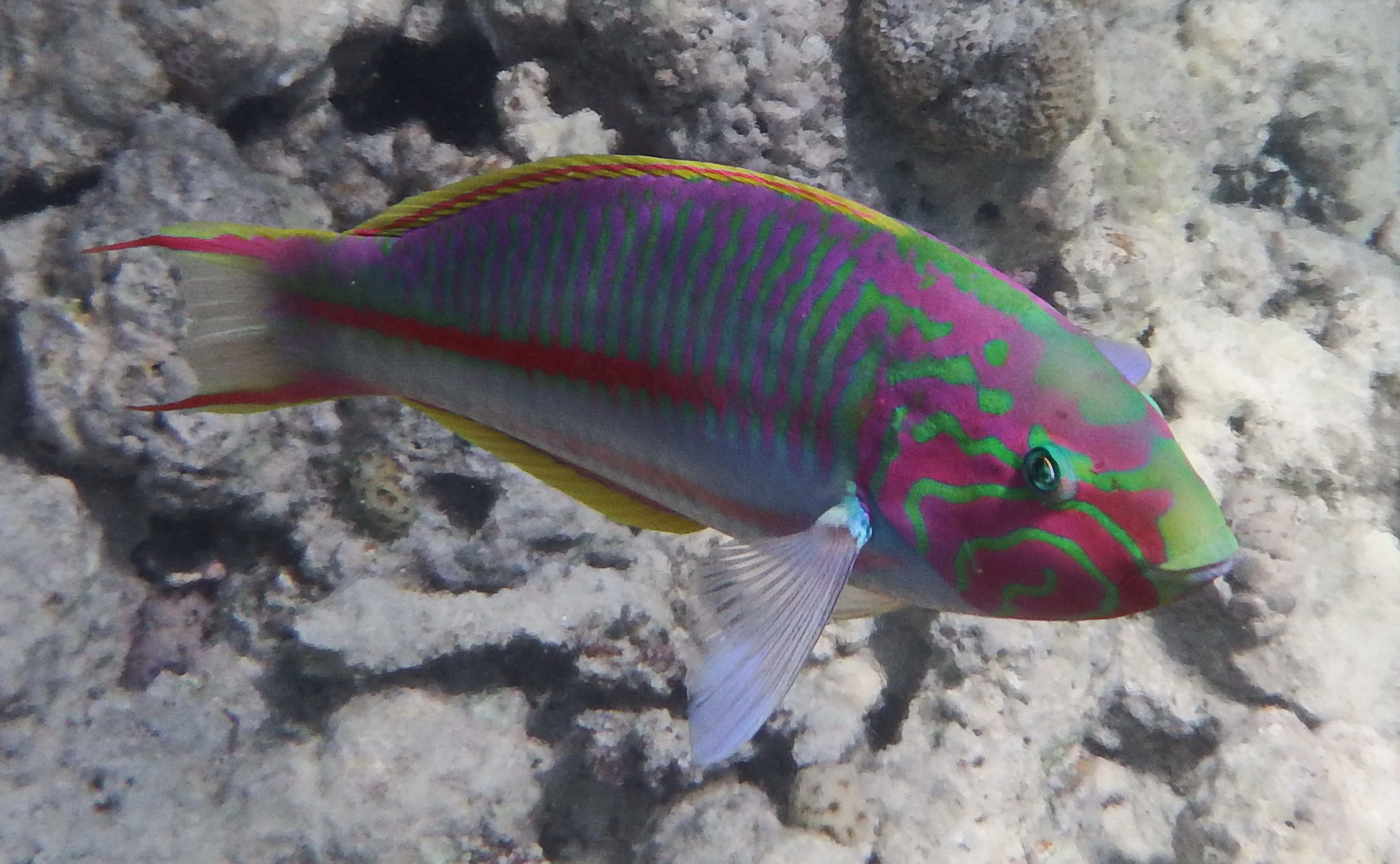 Klunzinger's wrasse (Eng) Thalassoma rueppellii (Thalassoma klunzingeri) (Lat).